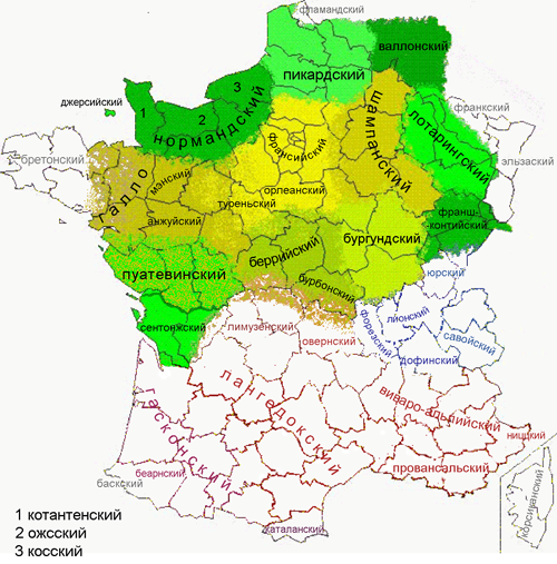 Карта языков и диалектов севернофранцузского ареала (ланг д’ойль)